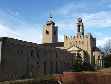 Voormalig klooster van de Kruisheren, Constantinianum, te Amersfoort, Rijksmonument. Architect Jos Schijvens.